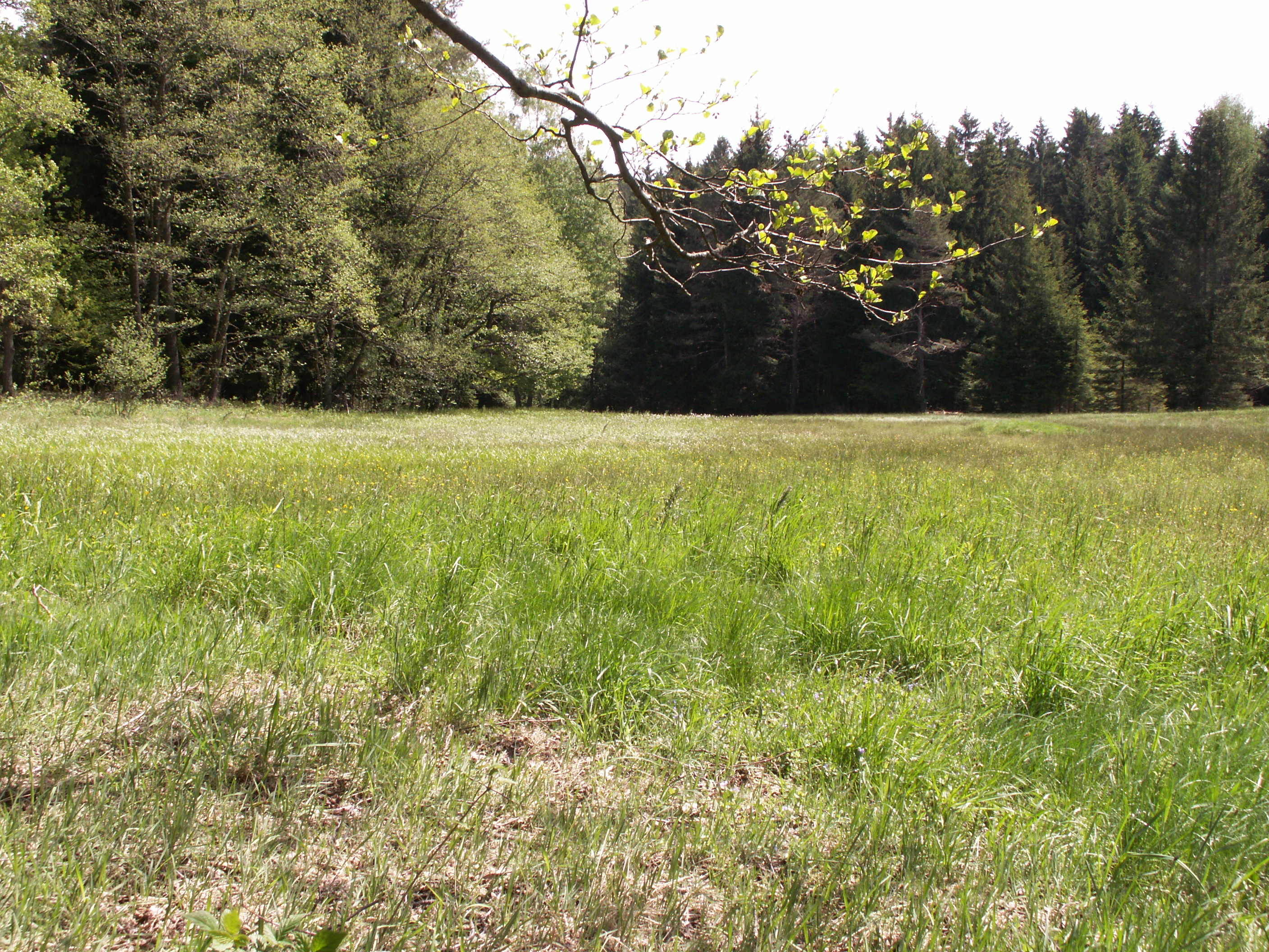 Přírodní rezervace Branty, okres Žďár nad Sázavou, kraj Vysočina